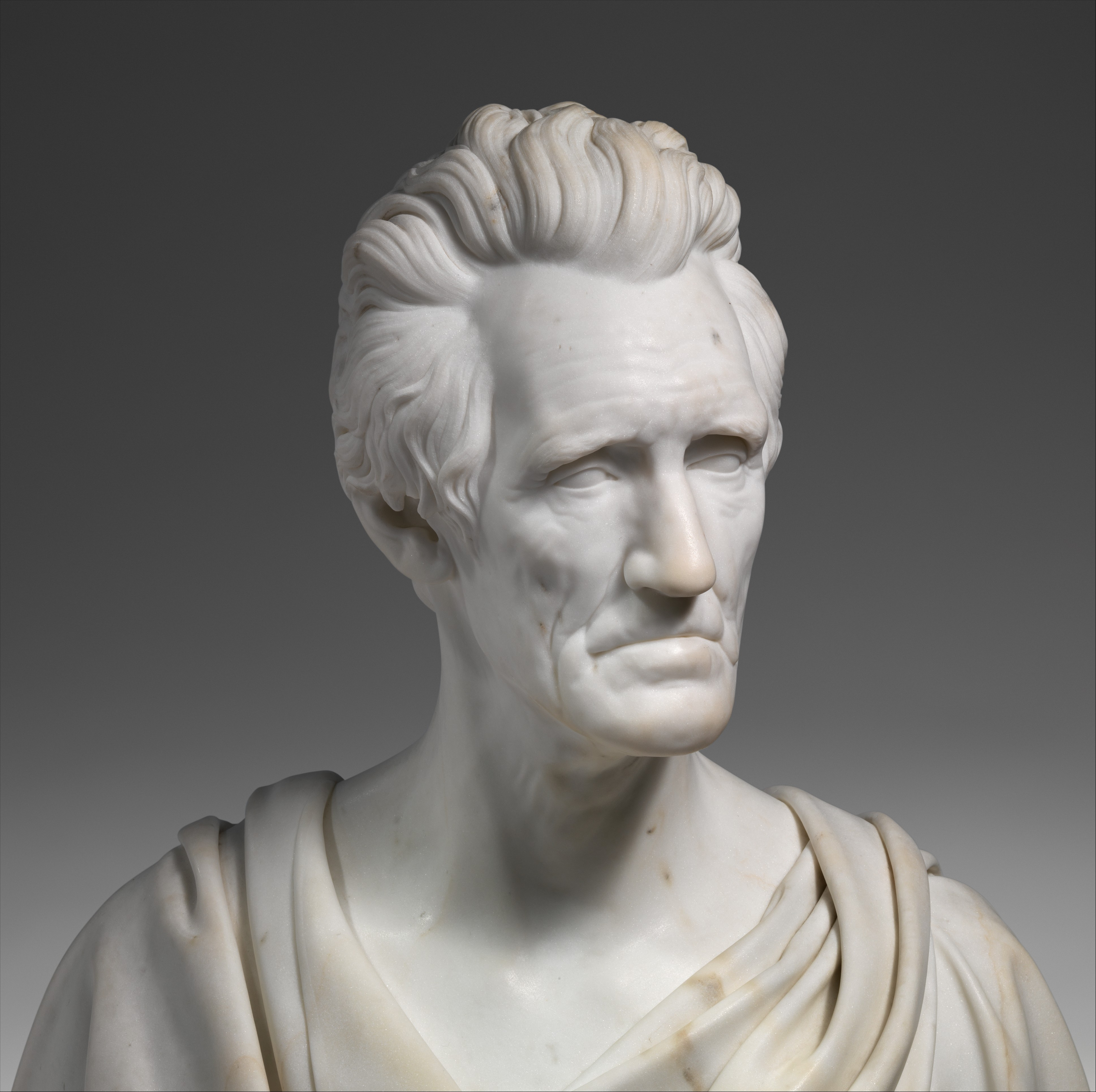 Bust; Sculpture